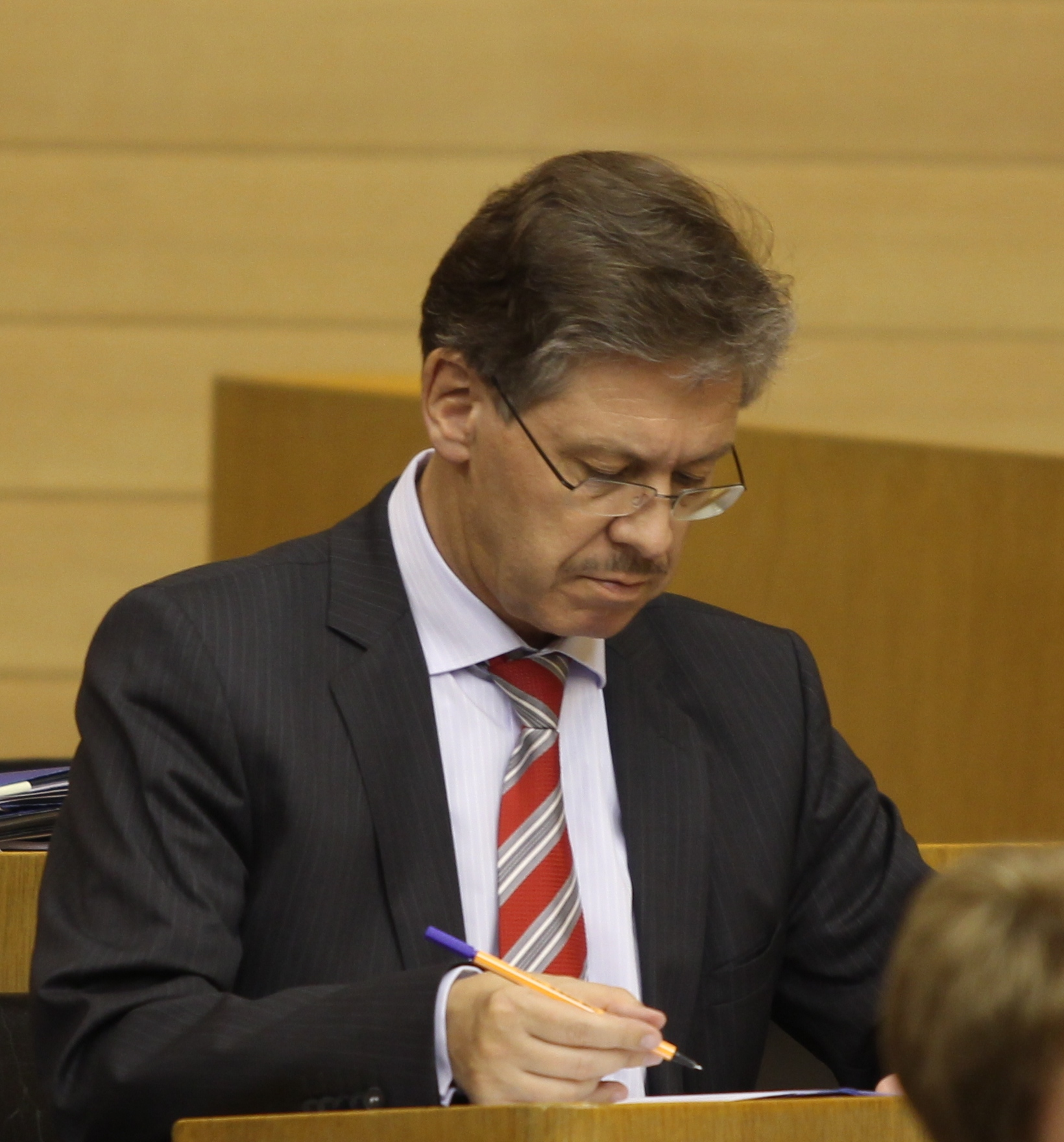 Dieter Hillebrand im Plenarsaal des Landtages von Baden-Württemberg. Wikipedia im Landtag – Baden-Württemberg 15.–16. Mai 2013 in Stuttgart Fragen zur Nachnutzung Wenn Sie Fragen zur Nachnutzung dieses Bildes haben, können Sie sich jederzeit gern an wenden Personality rights warningAlthough this work is freely licensed or in the public domain, the person(s) shown may have rights that legally restrict certain re-uses unless those depicted consent to such uses. In these cases, a model release or other evidence of consent could protect you from infringement claims.